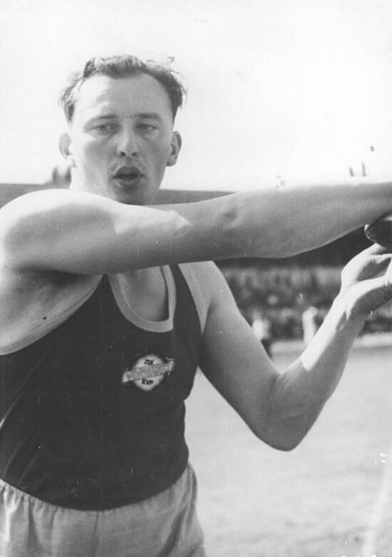 Martin Schölzgen Zentralbild Wlocka 24.7.1956 DDR-Leichtathletik-Meisterschaften in Erfurt In der Zeit vom 20. bis zum 22. Juli 1956 wurden im Erfurter Georg-Dimitroff-Stadion die VII. Leichtathletik-Meisterschaften der DDR ausgetragen. UBz: Im Diskuswerfen der Herren musste sich Martin Schölzgen (Vorwärts Berlin) mit einer Weit von 47,30 m mit dem zweiten Platz zufrieden geben. Abgebildete Personen: Schölzgen, Martin: Diskuswerfer-Trainer, DDR